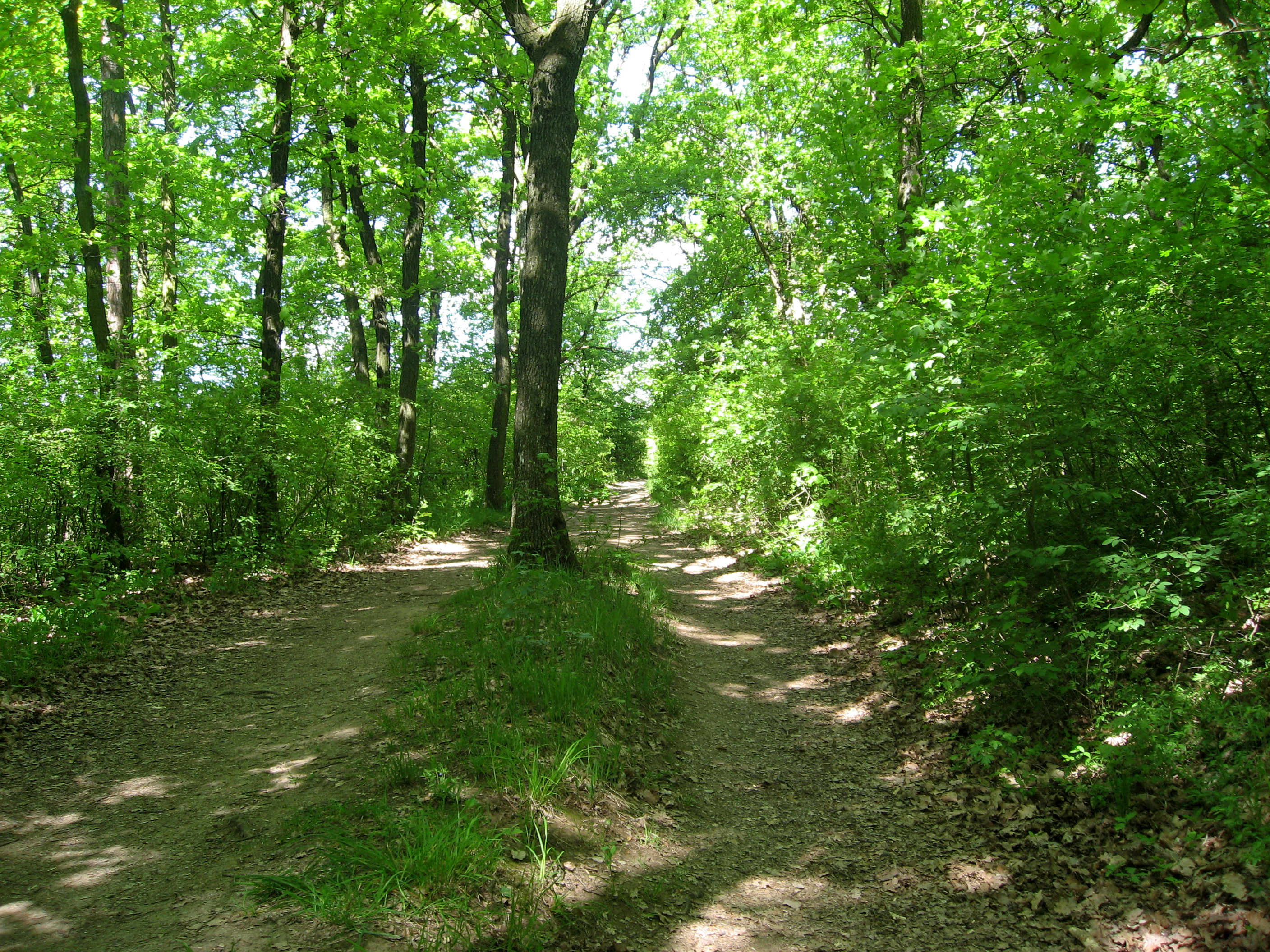 Hády, lesní cesta